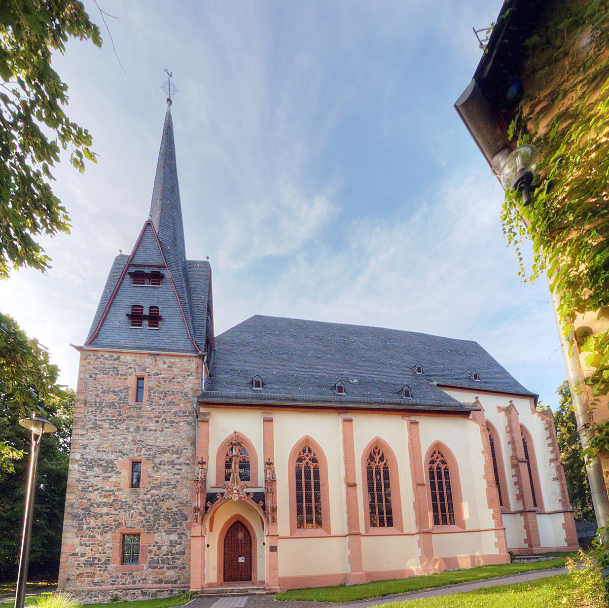 Marienkirche in Ortenberg im Wetteraukreis in Deutschland